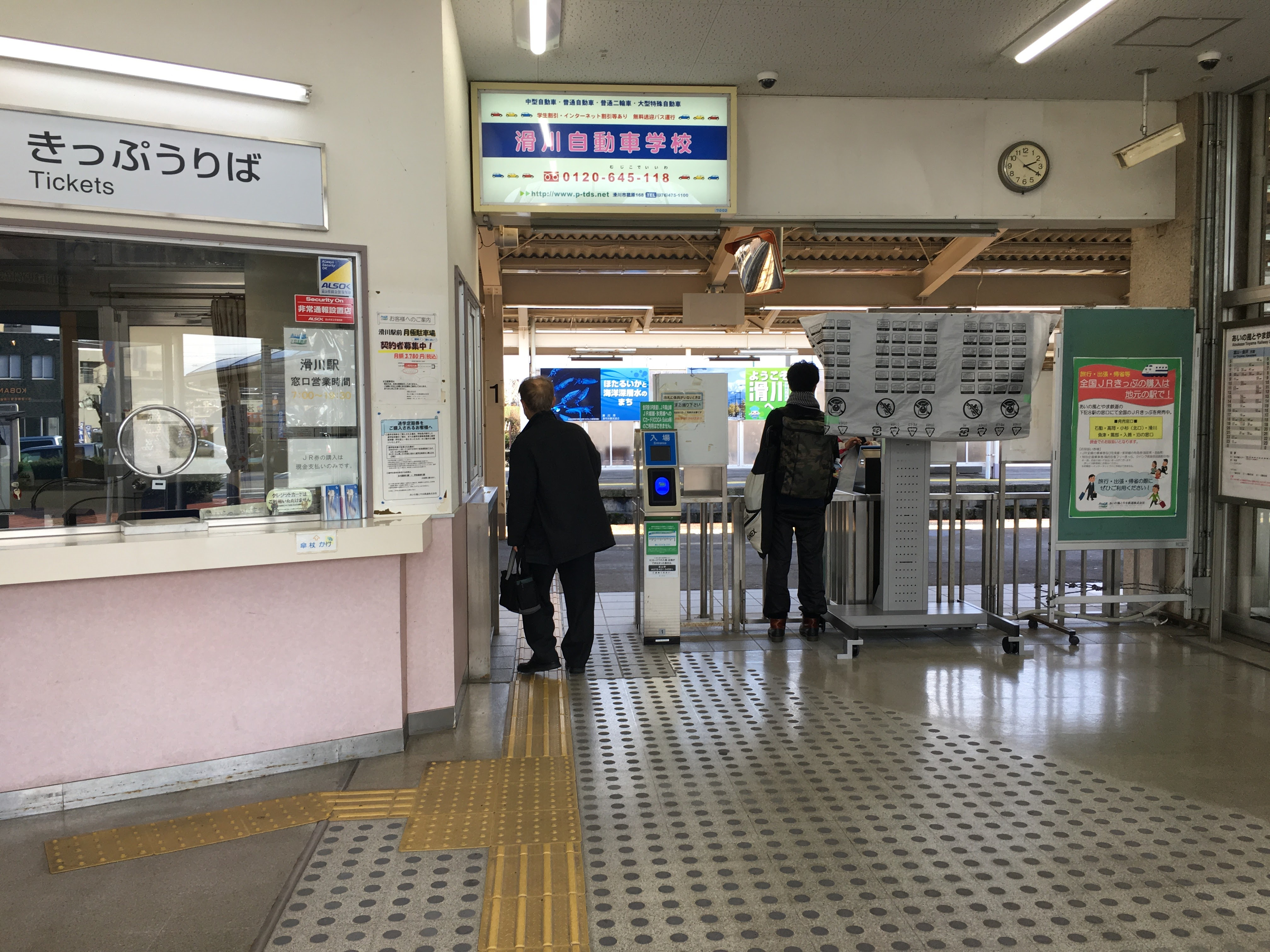 滑川駅の改札口と出札口